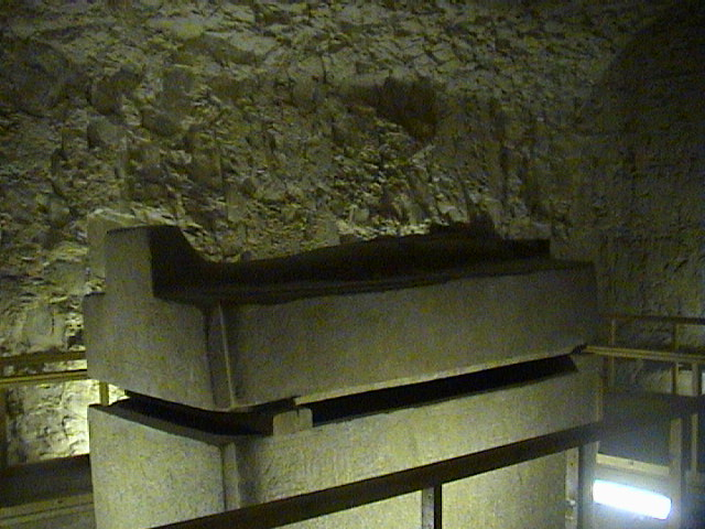 Sarcophage du Pharaon Siptah - Vallée des Rois